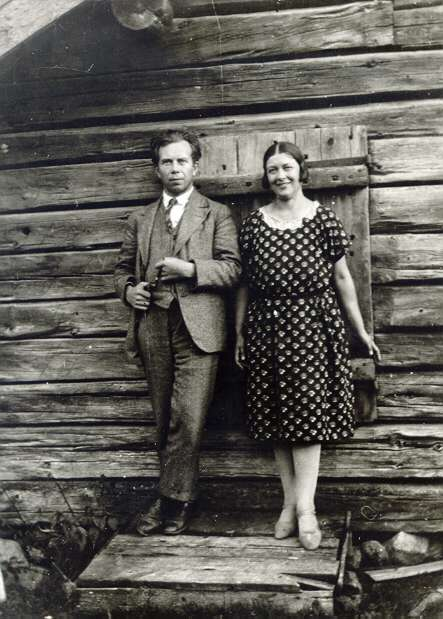 Ivar tillsammans med Maria Nordberg - "Måna"